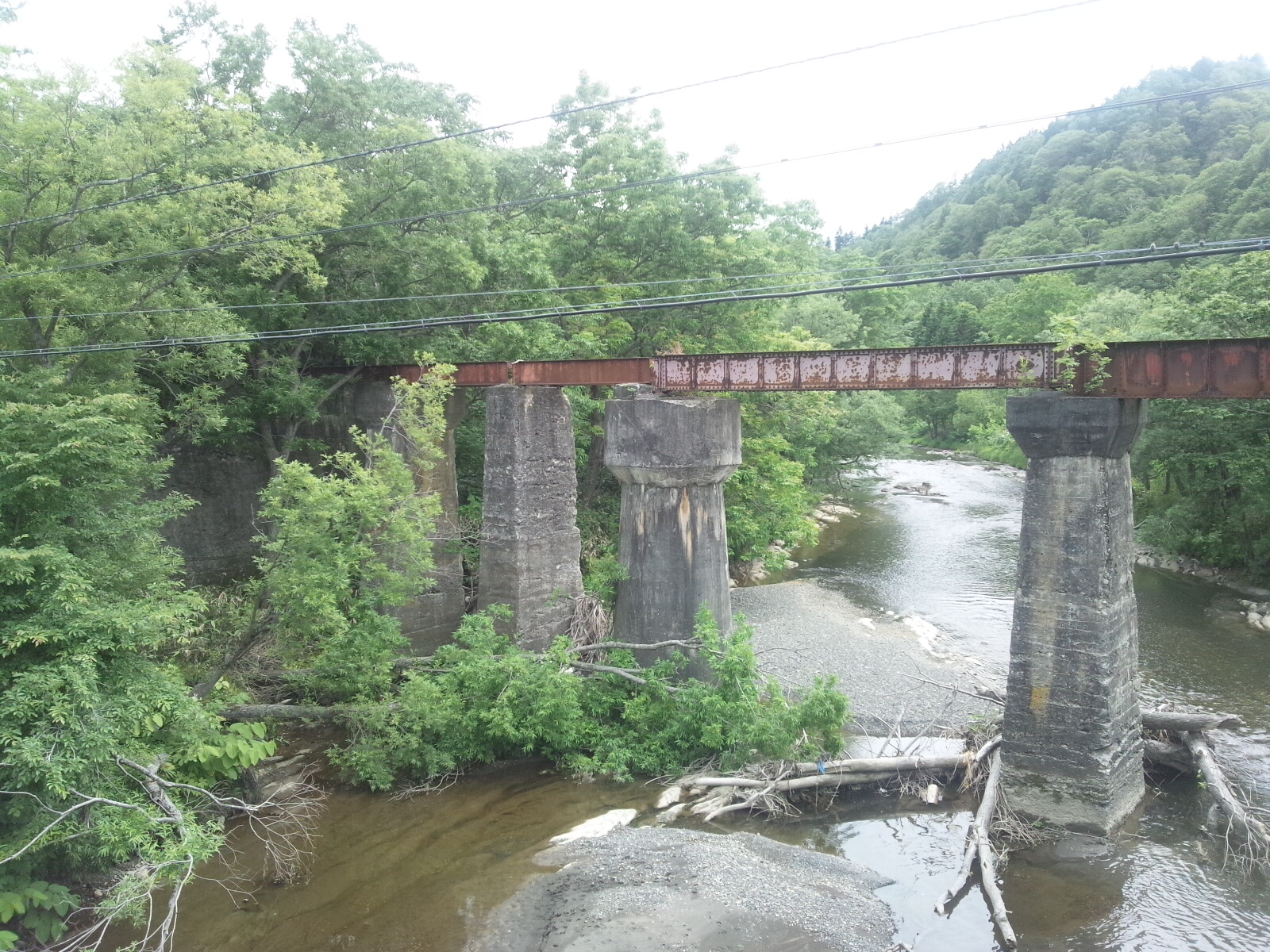 羽幌炭鉱鉄道の橋梁